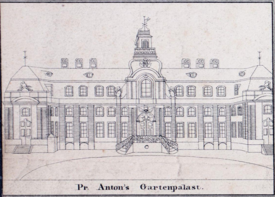 Prinz Antons Palais im Stadtplan von Heinrich Lesch, 1828